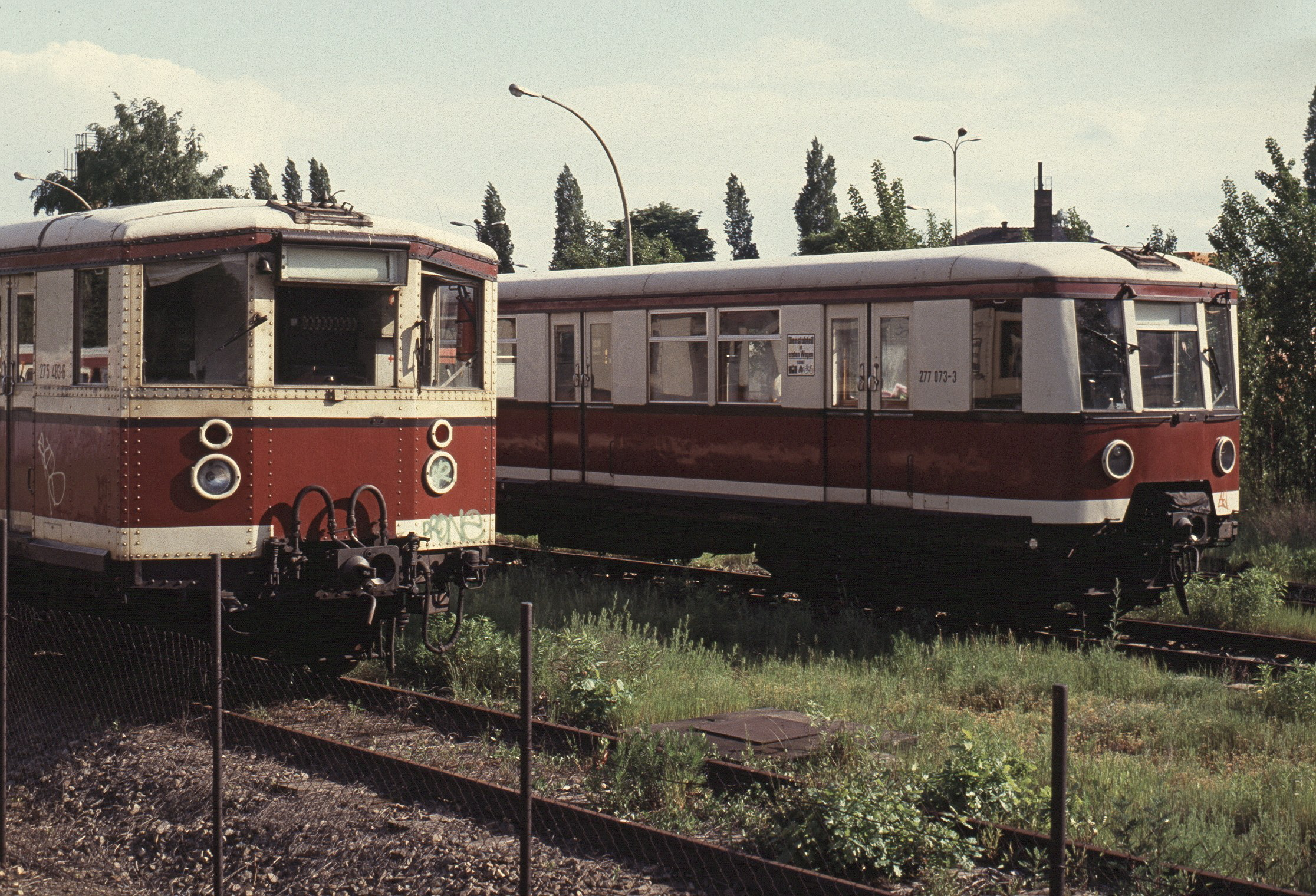 ET 165 und ET 167 abgestellt in Berlin Spindlersfeld